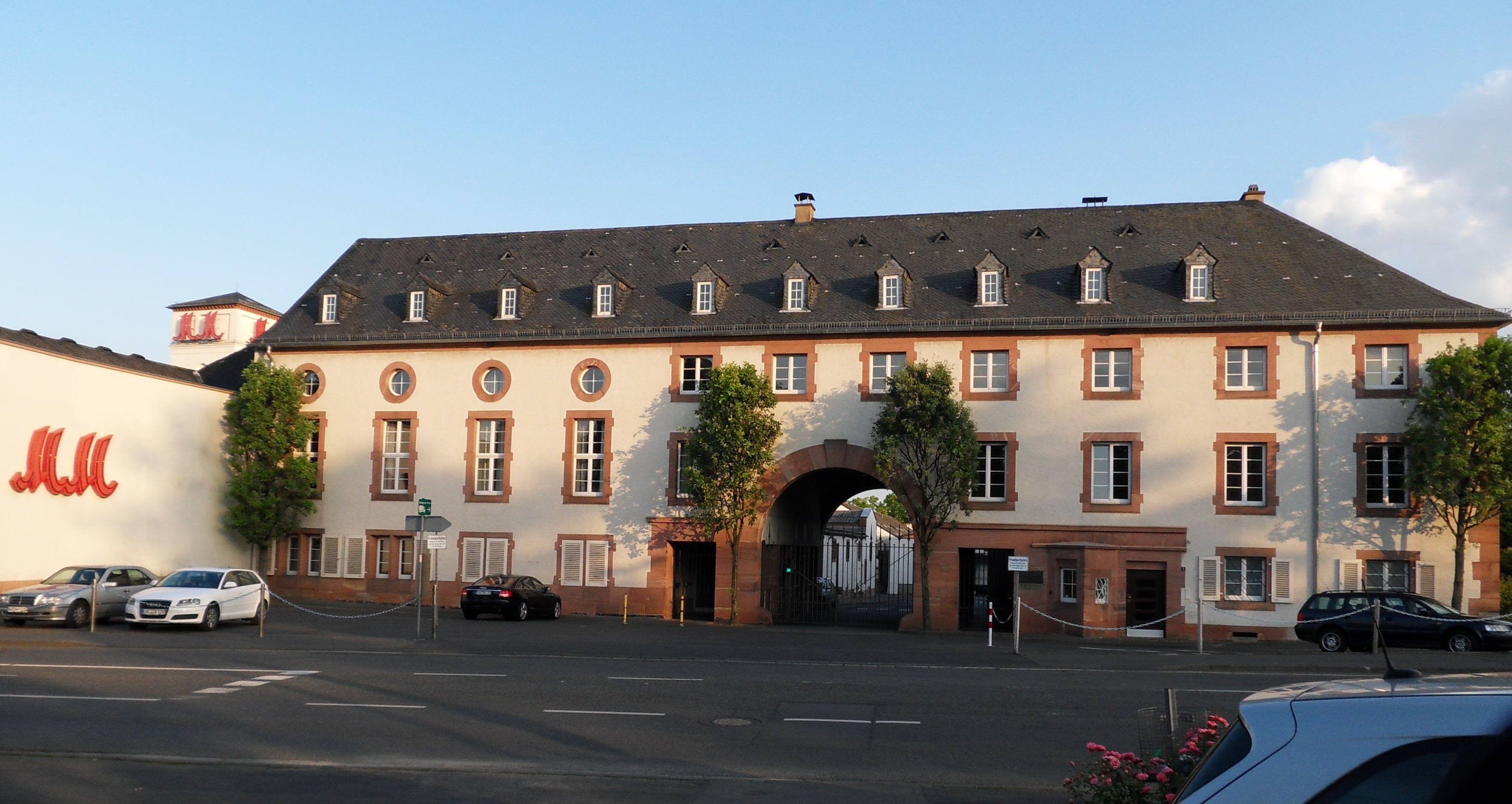 Hauptgebäude der Sektkellerei MM in Eltville am Rhein am Matheus-Müller-Platz, Blick von Norden